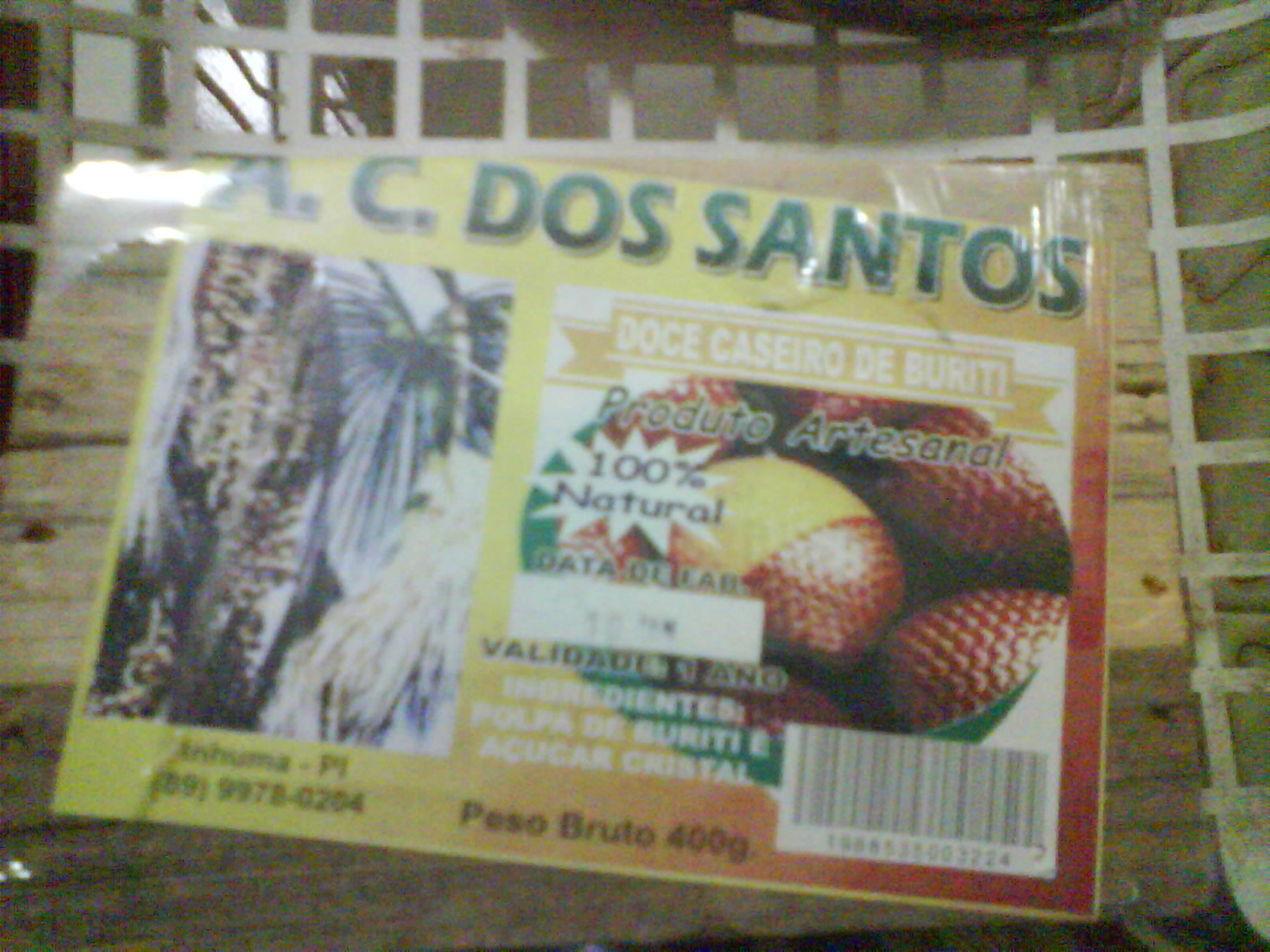 Doce de butiti vendido em caixa